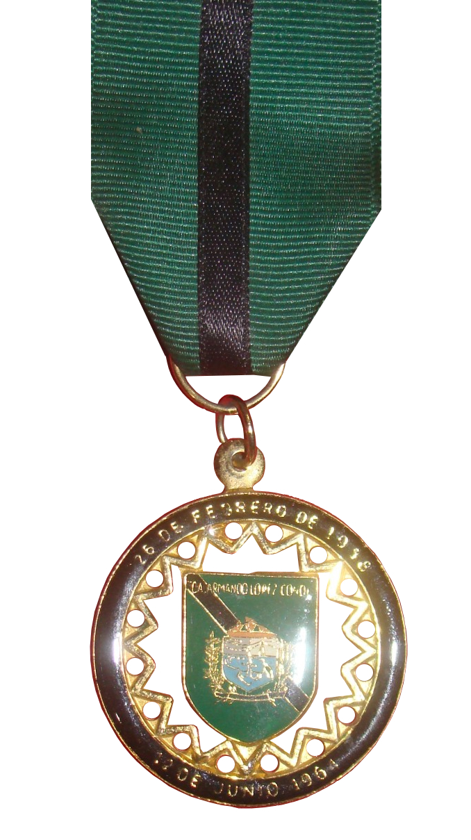 Medalla Naval ContraAlmirante Armando Lopez Conde infanteria de marina de Venezuela